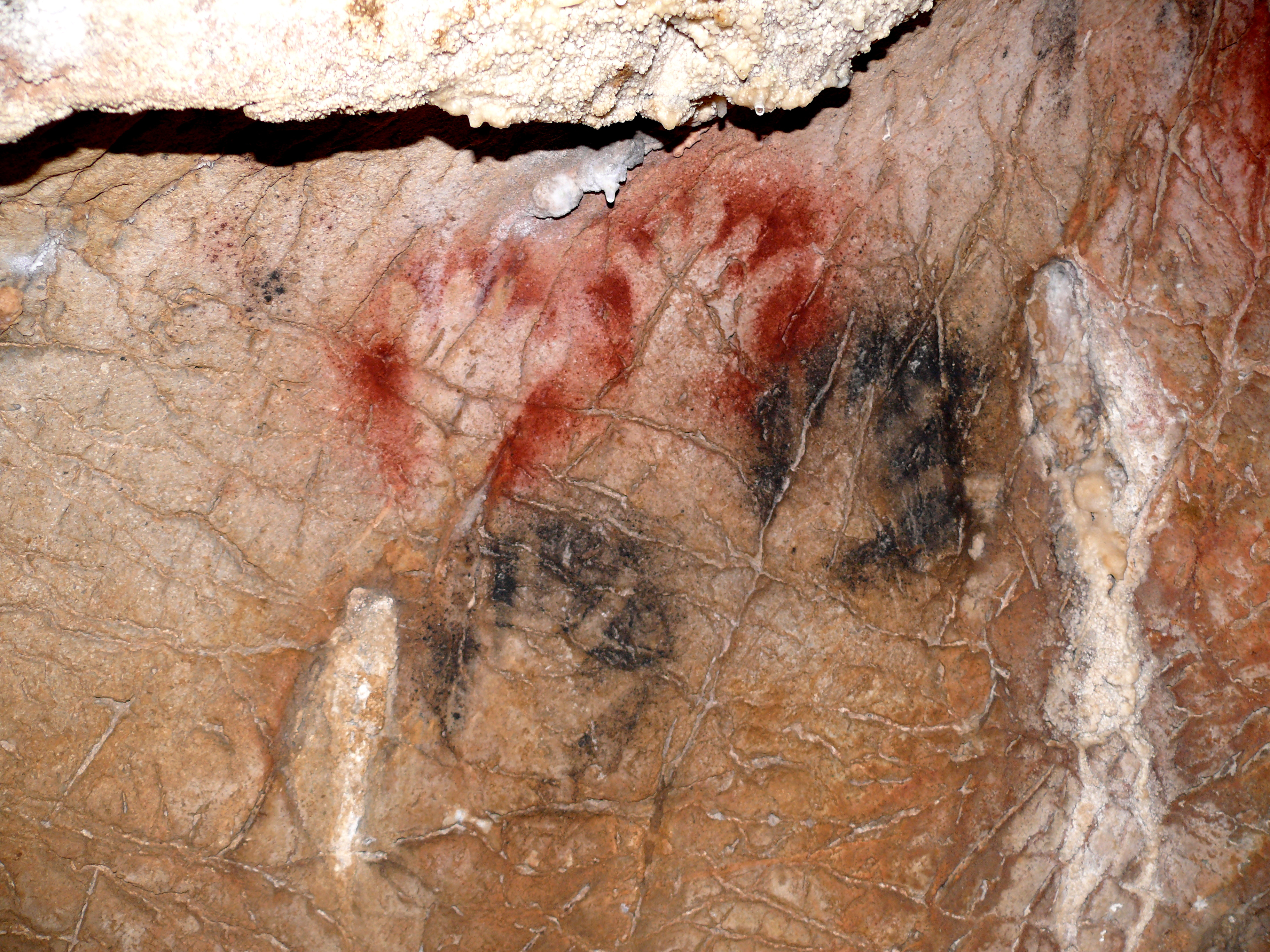 Grotte de Gargas (Aventignan) - Grande Paroi - Panneau 6- Mains noires et rouges doigts incomplets sauf pouce - Paléolithique supérieur - Gravettien